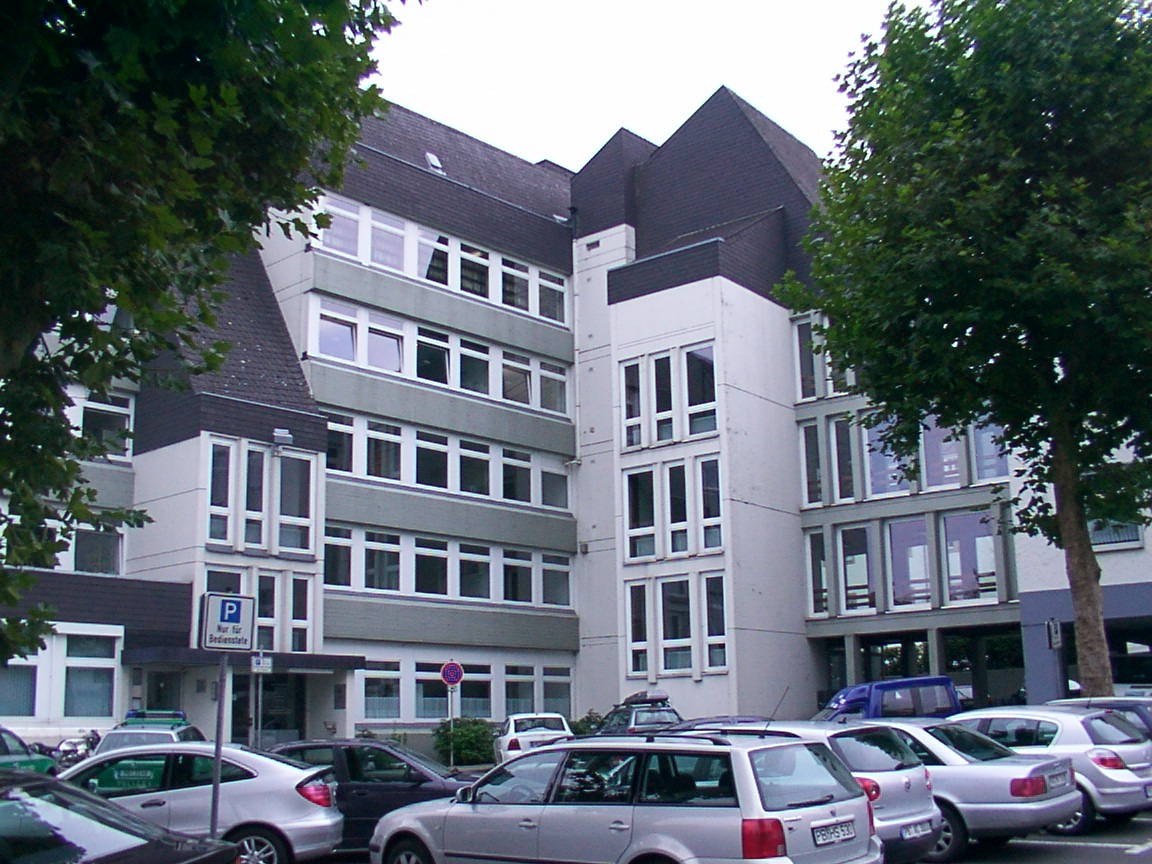 Kreis Paderborn: Verwaltungsnebenstelle in Büren (Westfalen)